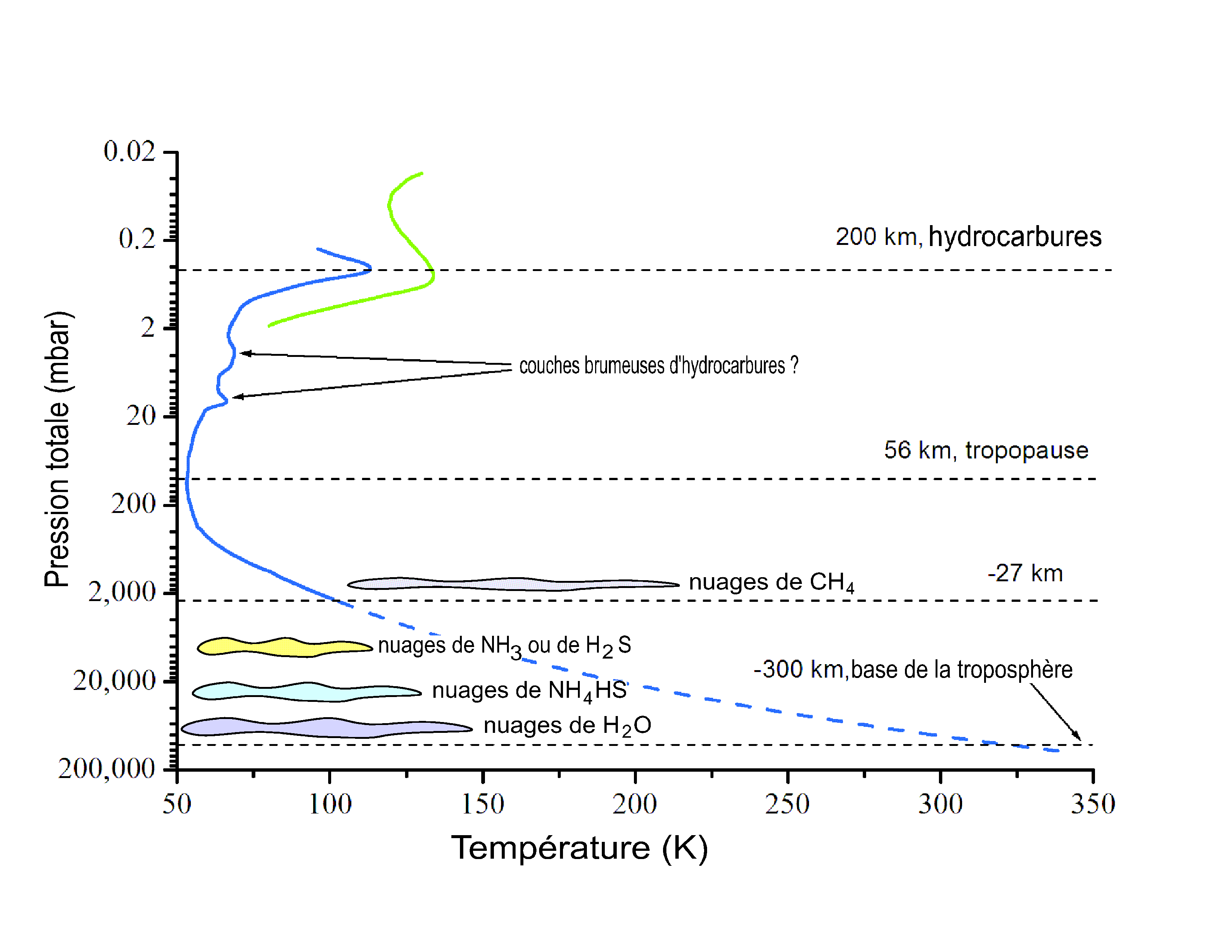 Ce graphique présente le profil des températures dans la troposphère et la basse stratosphère d'Uranus. L'altitude est indiquée. La courbe bleue provient de Lindal et al.[1]. La courbe verte provient de Bishop et al.[2] La courbe de pointillés bleues est une extrapolation des données Lindal et al. (1987)[1] using a constant lapse rate of 0.82 K/km. Le graphique indique aussi la localisation des principales couches nuageuses et brumeuses d'après Bishop et al.[2], Atreya et al.[3](1990) et dePater et al. [4] Références ↑ a b Lindal, G.F., Lyons, J.R., Sweetnam, D.N., Eshleman, V.R., Hinson, D.P., Tyler, G.L., 1987. The atmosphere of Uranus: Results of radio occultation measurements with Voyager 2. J. Geophys. Res. 92, 14987â€“15001 (Table 1); ↑ a b Bishop, J.; Atreya, S.K.; Herbert, F.; and Romani, P. (1990). "Reanalysis of Voyager 2 UVS Occultations at Uranus: Hydrocarbon Mixing Ratios in the Equatorial Stratosphere", Icarus 88: 448â€“463 (Table 1). ↑ Atreya, S.; Egeler, P.; Baines, K. (2006). "Water-ammonia ionic ocean on Uranus and Neptune?", Geophysical Research Abstracts 8: 05179 ↑ dePater, Imke; Romani, Paul N.; Atreya, Sushil K. (1991). "Possible Microwave Absorbtion in by H2S gas Uranusâ€™ and Neptuneâ€™s Atmospheres", Icarus 91: 220â€“233.